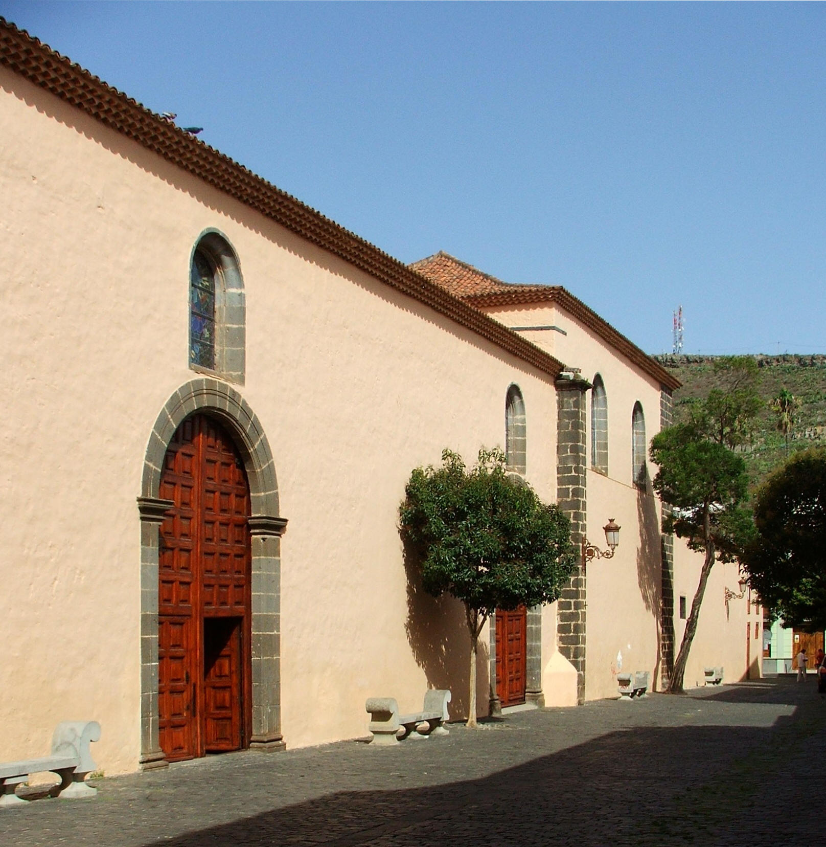 Convento Santa Clara La Laguna